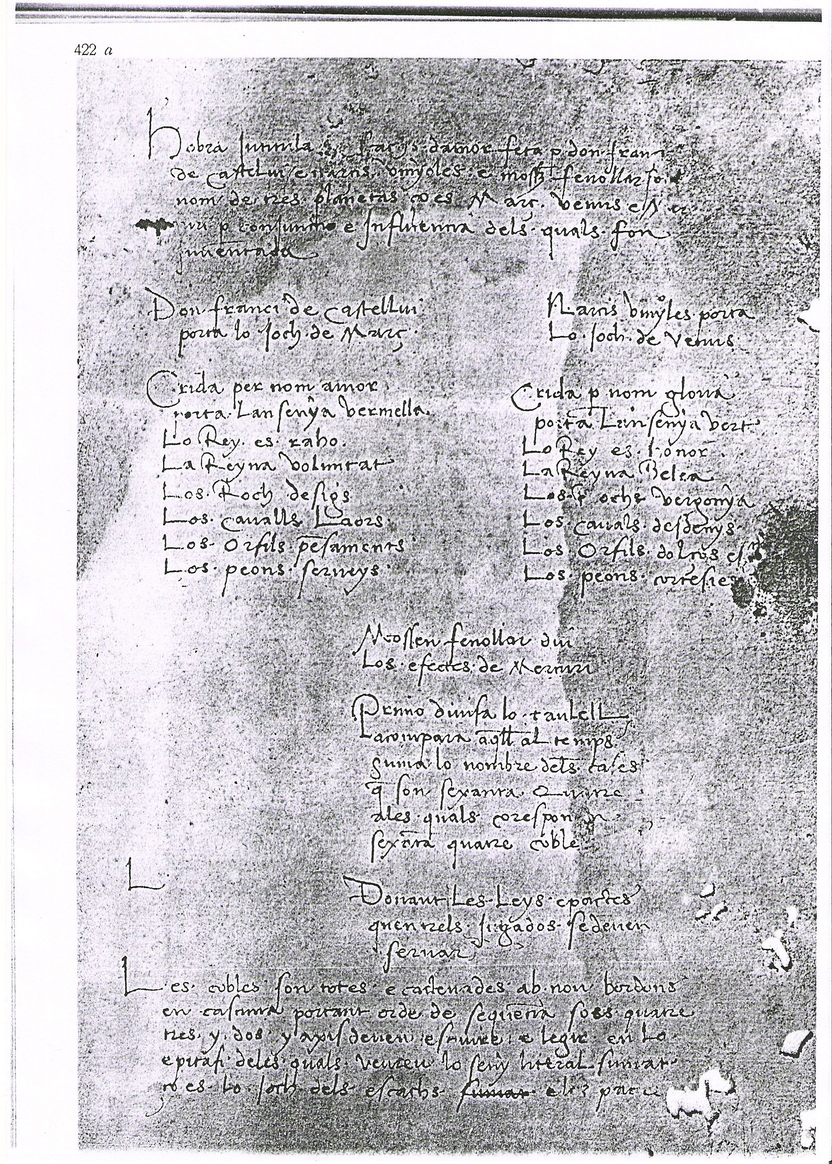 Portada del poema del siglo XV titulado Scachs d'amor